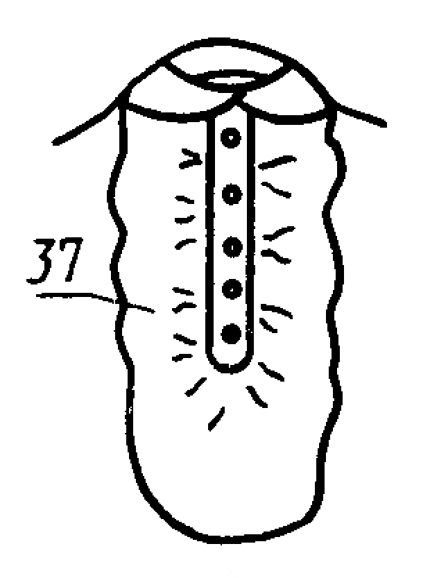 Изображение из ГОСТ 22977-89 (СТ СЭВ 6484-88) — Детали швейных изделий. Термины и определения.